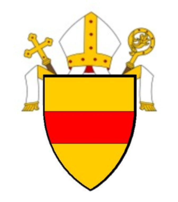 Bistumswappen Münster in Westfalen